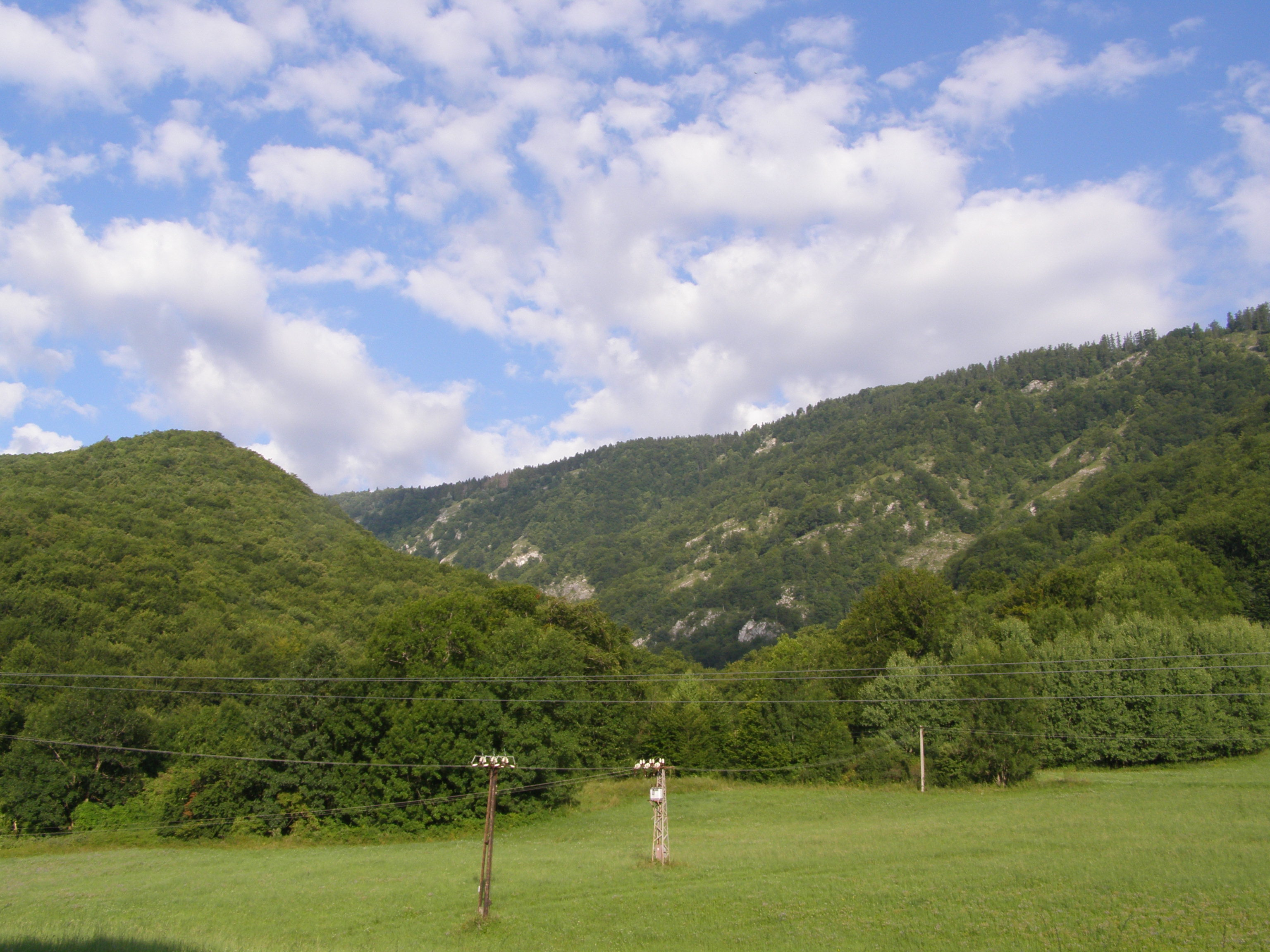 Slovenské rudohoří, Spišsko-gemerský kras, Muráňská planina, NPR Šarkanica, pohled od východu